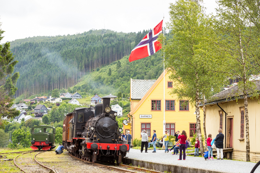 Museumstoget Gamle Vossebanen på Garnes stasjon